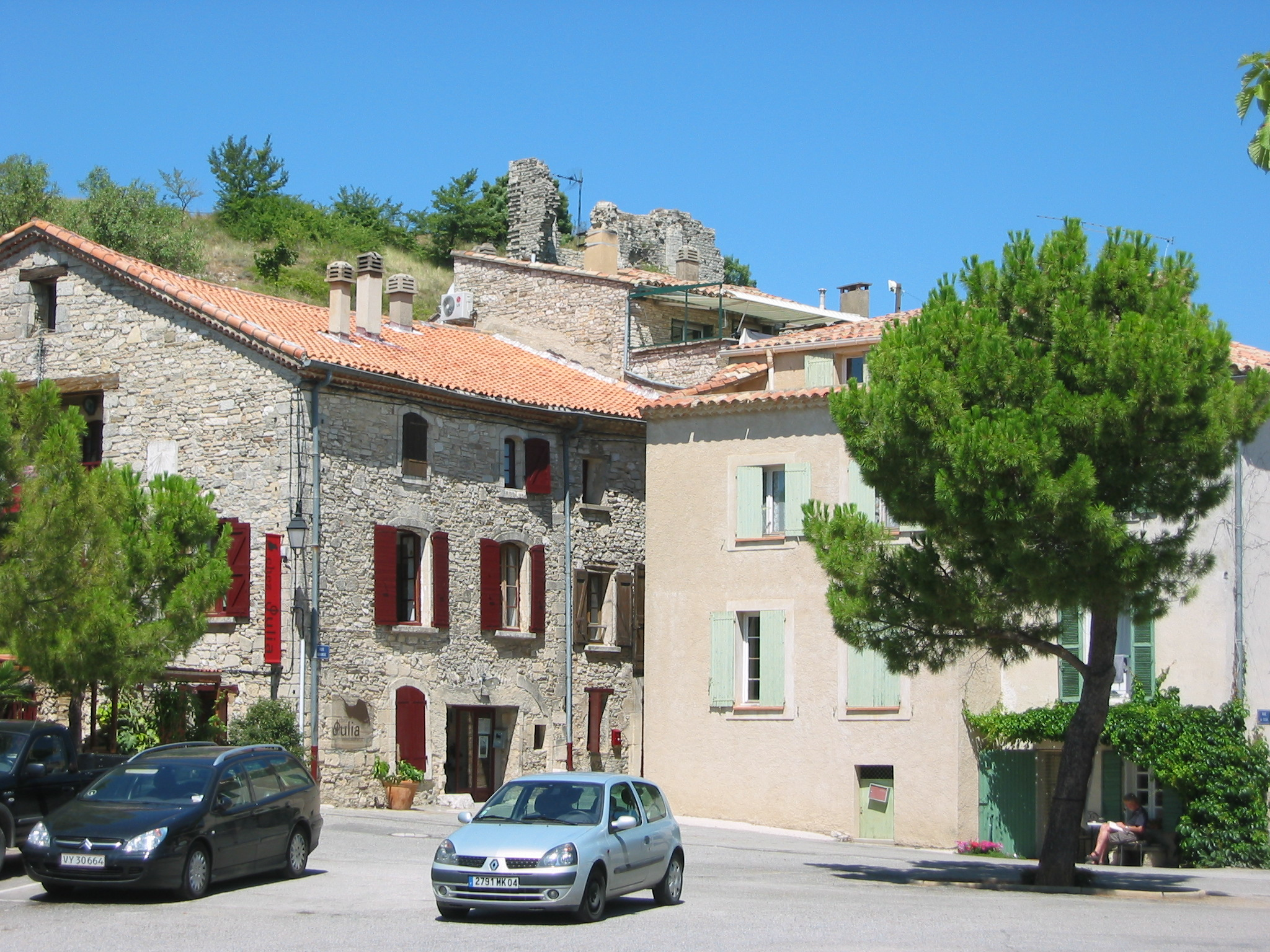 Montfuron, Alpes-de-Haute-Provence, France Les rues du village Photo prise le 30 juillet 2006 Aut : civodule